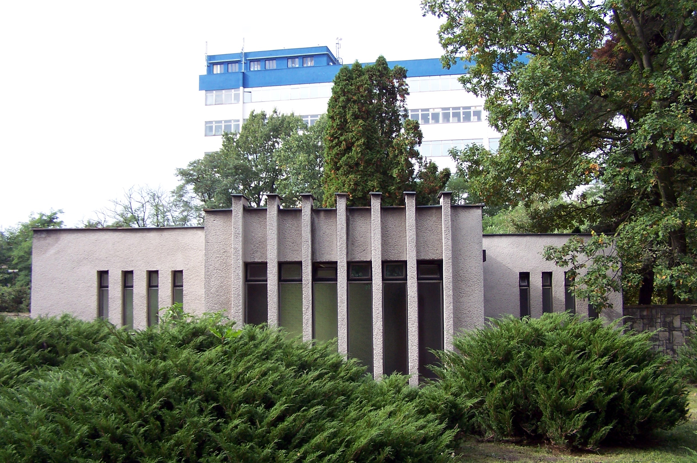 Památník Zámeček ve stínu Tesly, nyni Foxconnu.